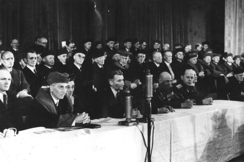 Berlin, Eröffnung der Humboldt-Universität Zentralbild /Vitanova Eröffnungsfeier der Humboldt-Universität in Berlin am 29.1.1946 U.B.z.: vorn am Tisch: Prof. Dr. Theodor Brugsch, Paul Wandel, Präsident der deutschen Zentralverwaltung für Unterricht und Volksbildung der sowjetischen Besatzungszone und Oberst Sergei Tulpanow, Leiter der politischen Abteilung bei der Sowjetischen-Militär-Administration 5222-50 Abgebildete Personen: Brugsch, Theodor Prof. Dr. med.: Direktor der 1. Medizinischen Klinik der Charité Berlin, DDR (GND 118516019) Tulpanow, Sergej Prof.: Leiter der politischen Abteilung der SMAD, Prorektor Universität Leningrad, Sowjetunion Wandel, Paul Dr.: Minister für Volksbildung, stellvertretender Minister für Auswärtige Angelegenheiten, Präsident der Liga für Völkerfreundschaft, SED, DDR